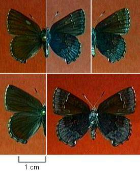 Incisalia polia